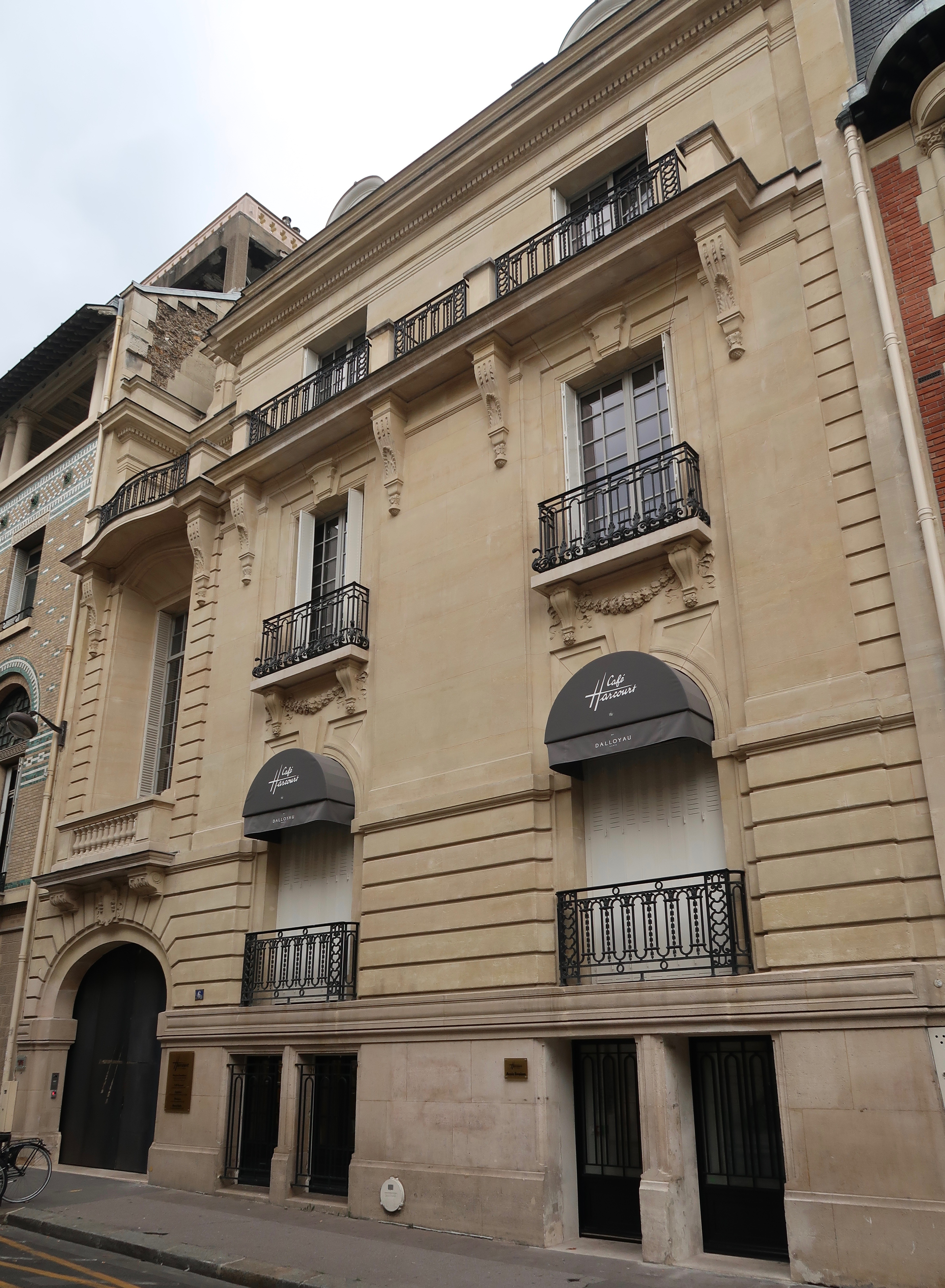 8 rue de Lota (Paris 16e). Studio Harcourt.